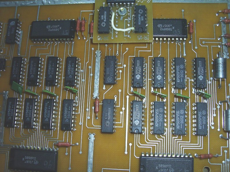 Dubna 48K RAM